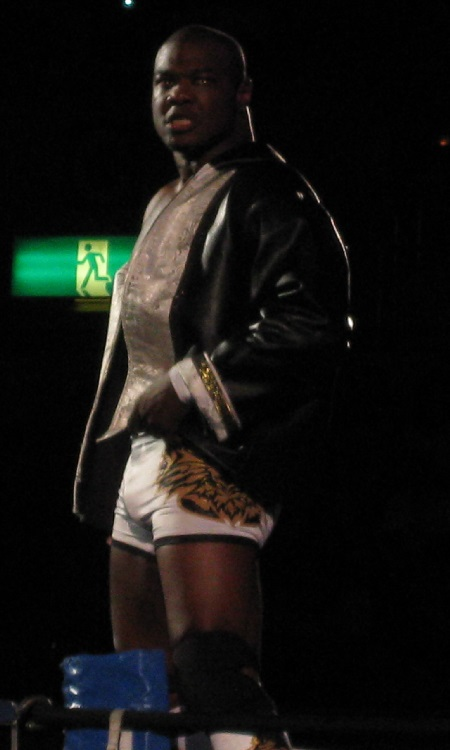 2013年9月29日 ワールド記念ホール 「DESTRUCTION」 シェルトン・X・ベンジャミン